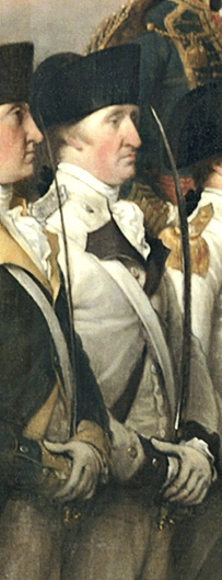 Freiherr Christian von Zweybrücken (links) und General Mathieu de Montmorency-Laval (rechts). Ausschnitt aus dem Gemälde "Surrender of Lord Cornwallis in Yorktown (1781)", von John Trumbull (1756–1843). Personenidentifizierung nach: Prinz Adalbert von Bayern, "Der Prinz und die Tänzerin", Pfälzische Verlagsanstalt, Neustadt an der Weinstraße, 1966, Tafel nach Seite 144